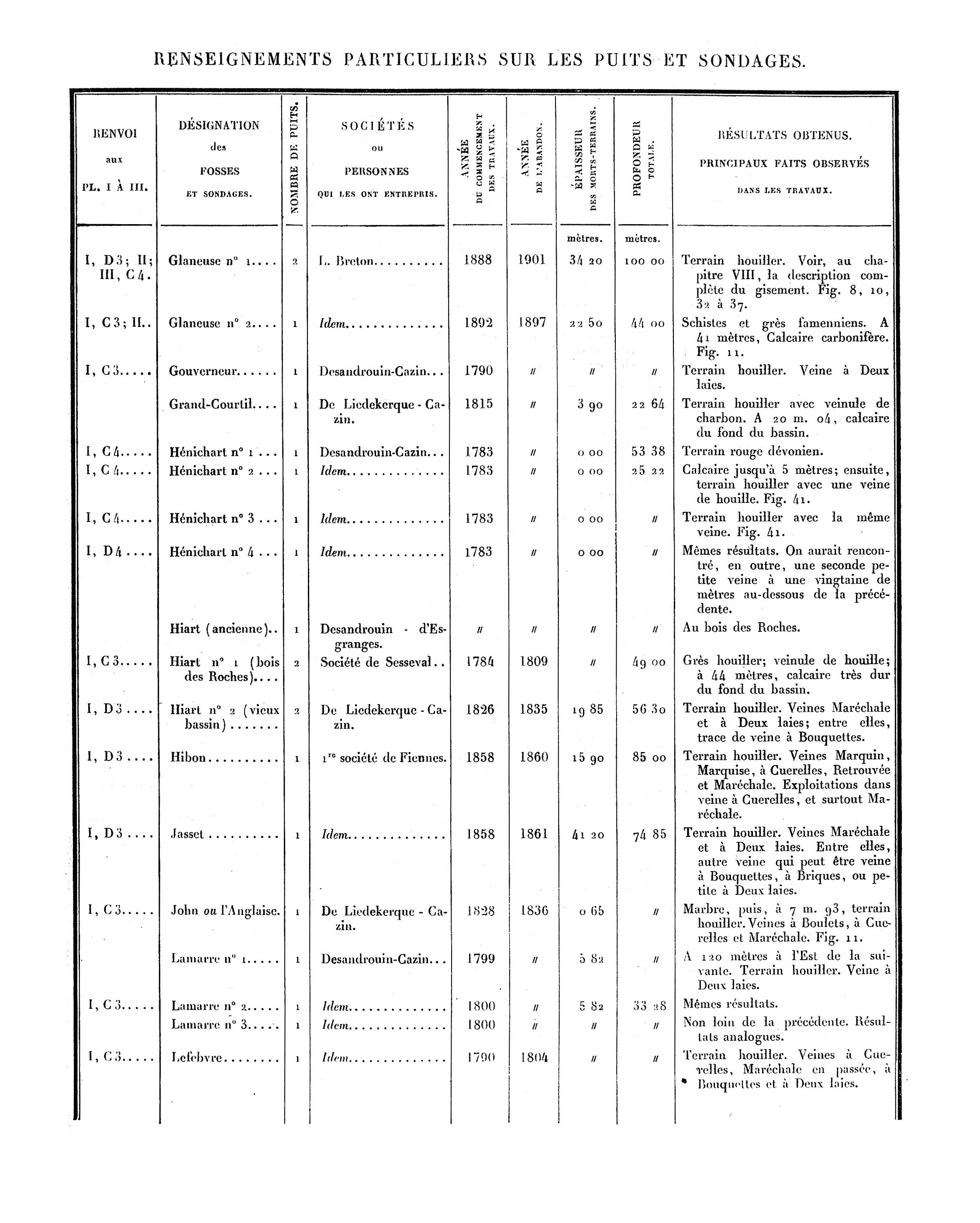 Liste des puits de mine et des sondages. Mines du Boulonnais. Document extrait de Étude des Gîtes Minéraux de la France. Topographie Souterraine du Bassin Houiller du Boulonnais ou Bassin d'Hardinghen, par A. Olry, ingénieur en chef des Mines. Chapitre IX, pages 172 à 189.